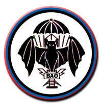 Patch della Batteria Acquisizione Obiettivi del 13° Gruppo Acquisizione Obiettivi "Aquileia" della 3° Brigata Missili "Aquileia"